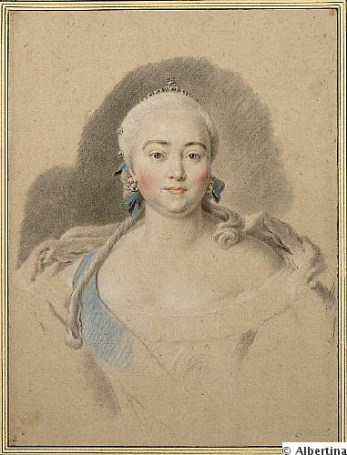 Brustbild der Kaiserin Elisabeth von Russland // 37 x 28 cm // Pastellkreiden auf braunem Papier // Inventarnummer 4250 // Graphische Sammlung // Albertina